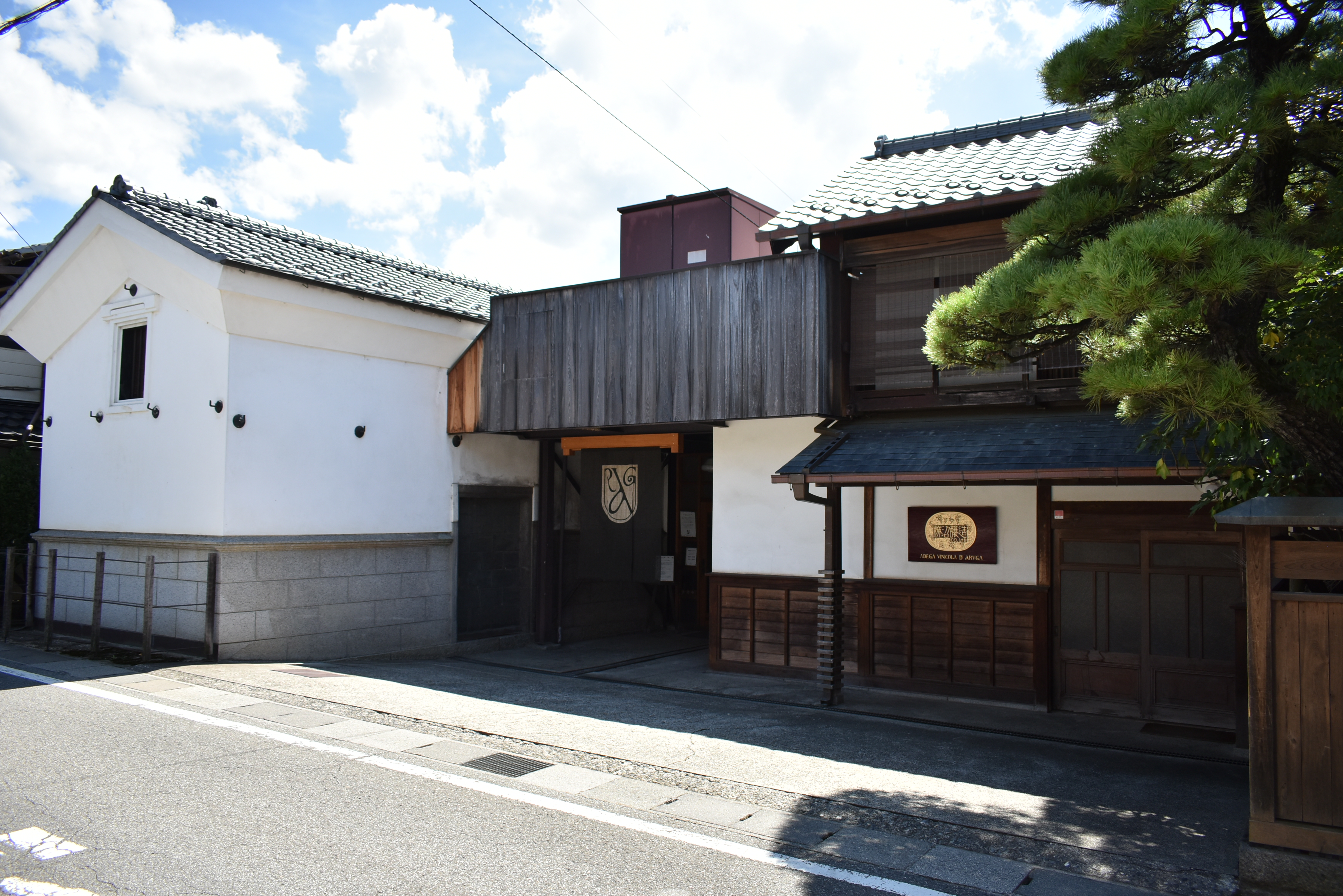 山梨県 勝沼醸造